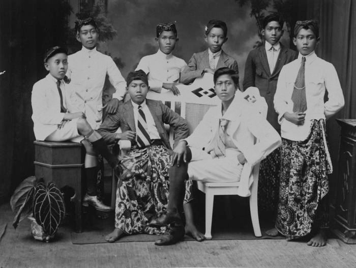 foto. Leerlingen van de School tot Opleiding van Indische Artsen (STOVIA), Doctor Jawa